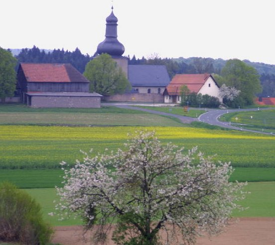 Hohenpölz in der Fränkischen Schweiz (für Public Domain)